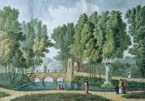 Вид на Круглый пруд со статуей Нептуна и Каменный мост в Строгановском саду. 1812. Бумага, акварель. Из альбома С.В.Строгановой